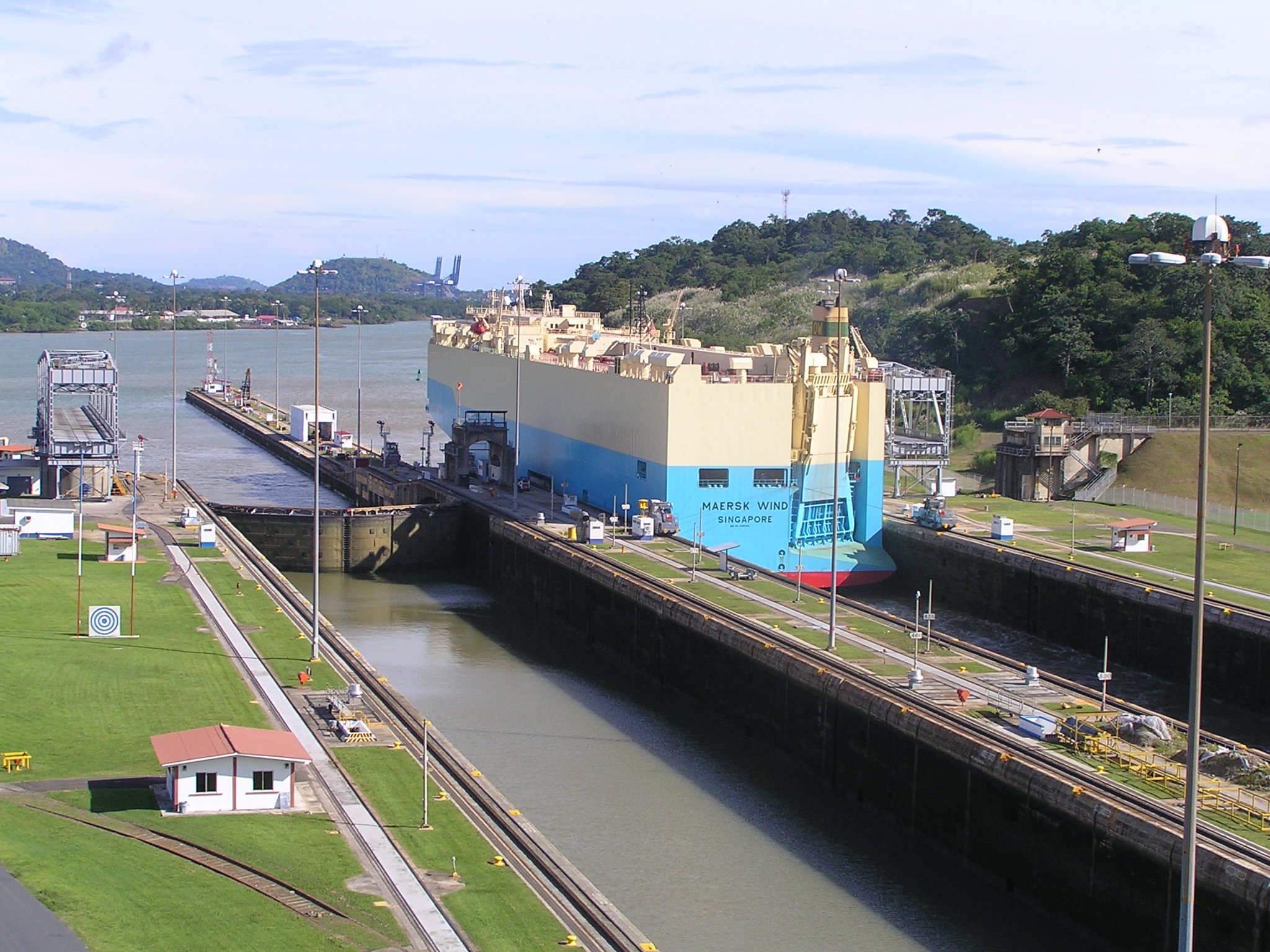 Miraflores Locks